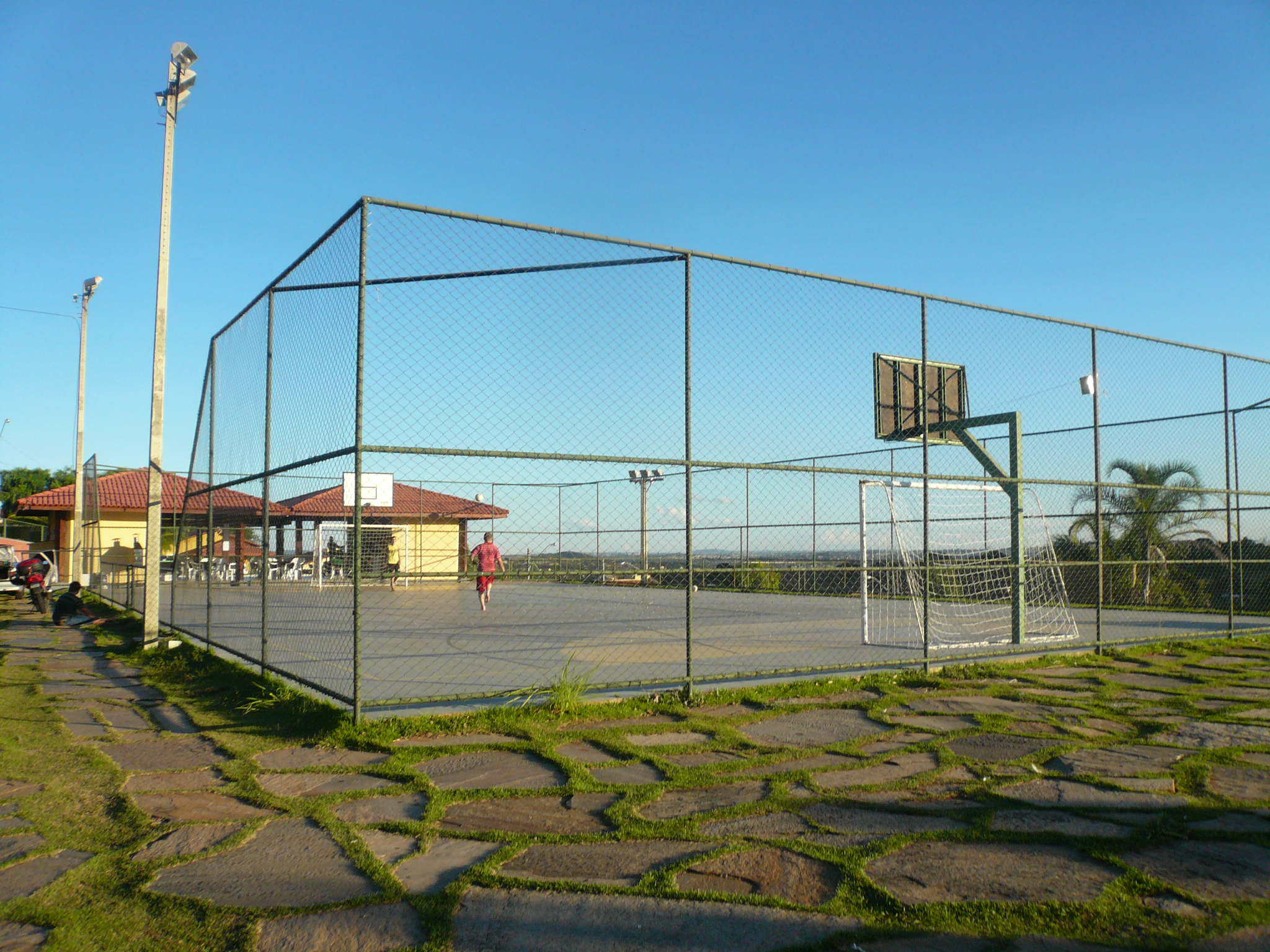 Condomínio Monte Verde, Goiânia, Goiás.